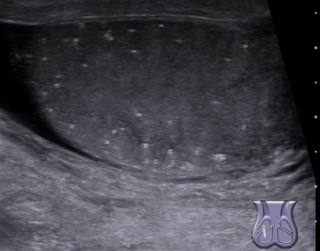 Mikrolithiasis testis in der Sonographie als Zufallsbefund. Es zeigen sich beidseits multiple kleine echoreiche Verkalkungen.